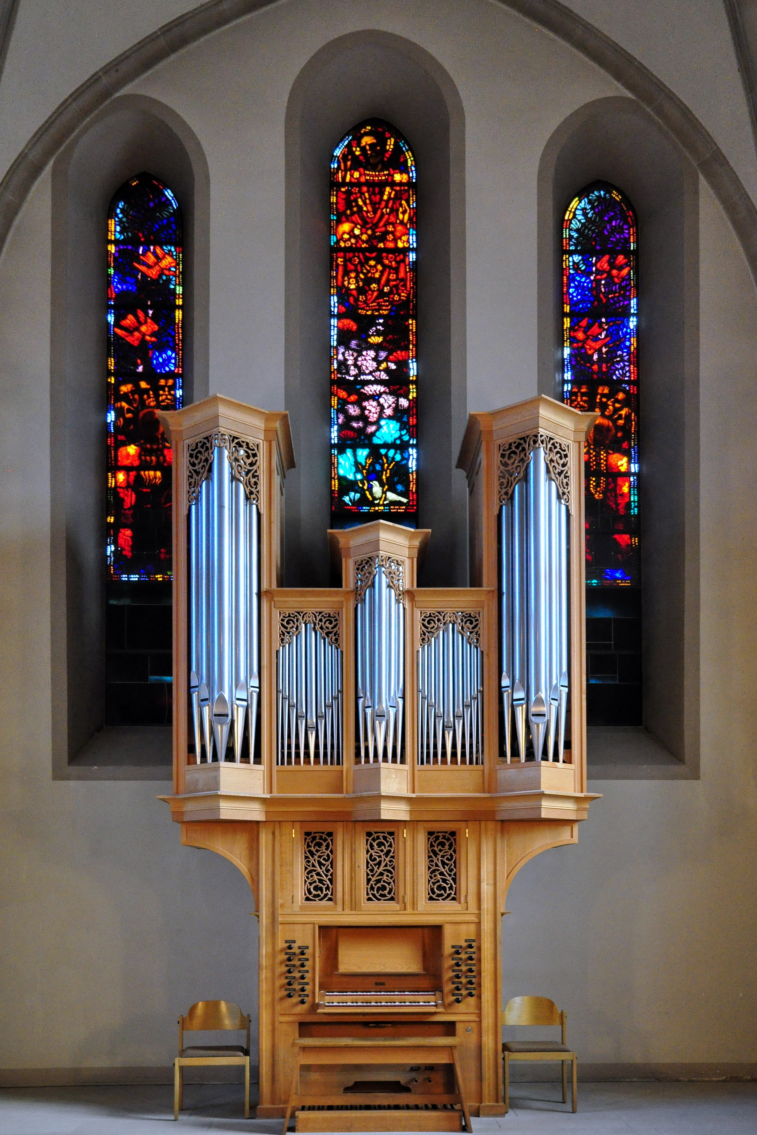 Reformierte Stadtkirche, Kirchplatz 1 in Winterthur (Switzerland)